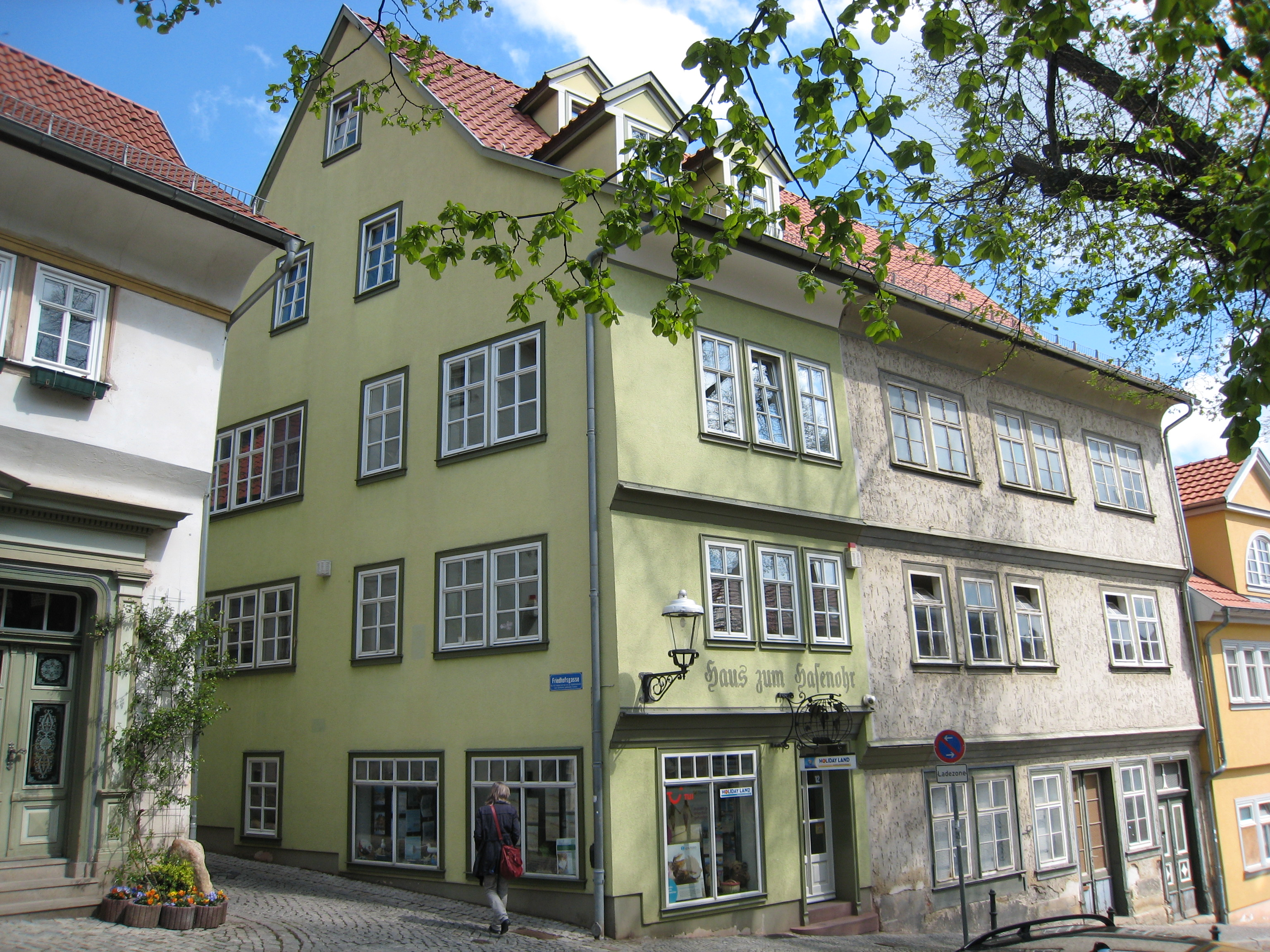 Haus Zum Hasenohr, mit dem alten Haus Auf dem Friedhof vereinigt, Arnstadt, An der Neuen Kirche 12